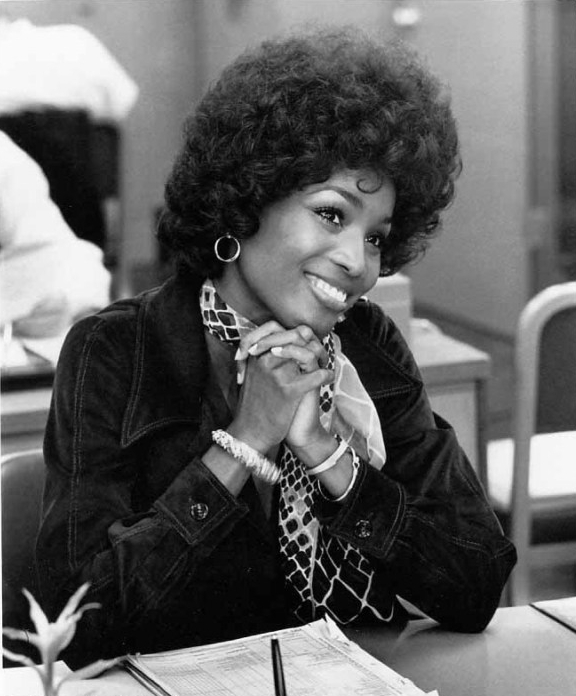 Teresa Graves, Get Christie Love, Marker for Murder Sept. 11, 1974